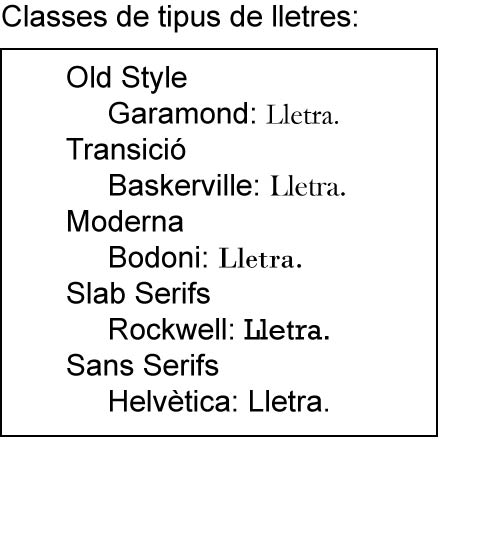 Classes de tipus de lletres.